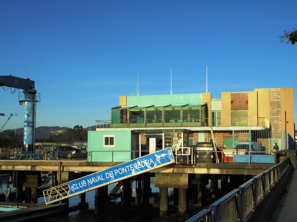 Club Naval en Pontevedra capital